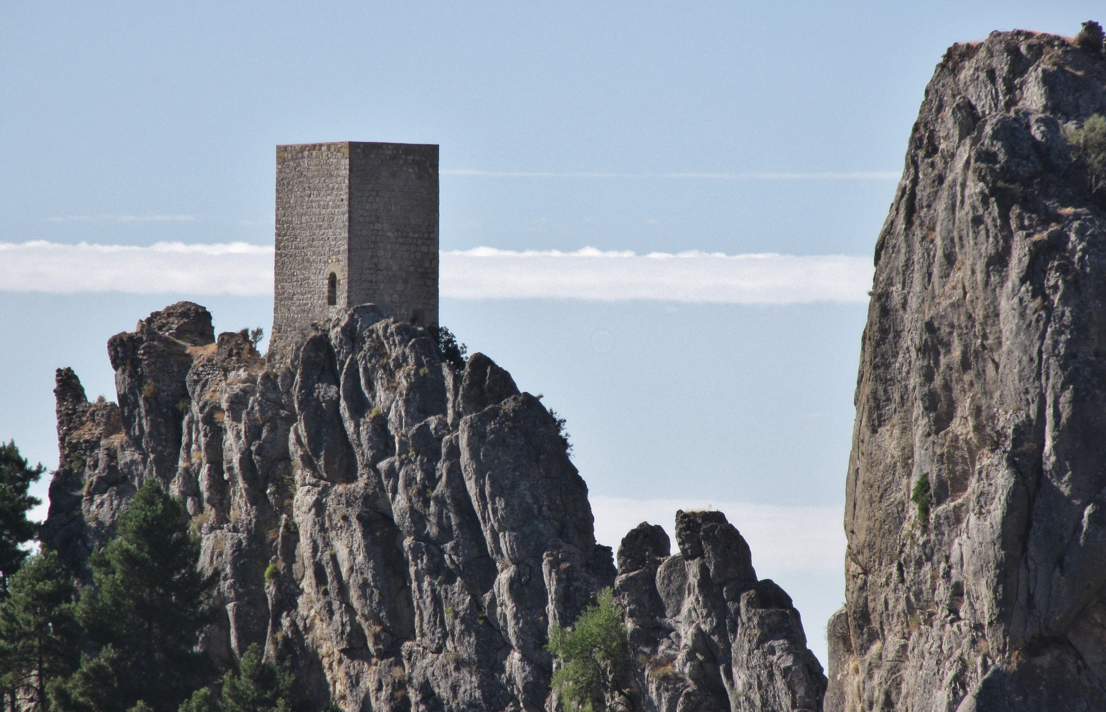 Castillo de Tíscar, en la provincia de Jaén. (España).